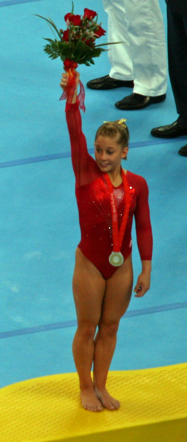 2008 OG - podium, Nastia Liukin and Shawn Johnson win the Women's Overall Gold and Silver medals respectively